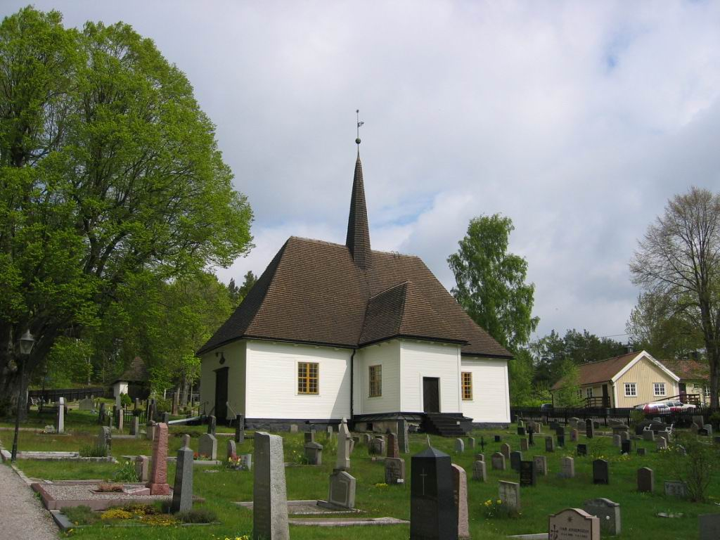 ©2005 Zaphod